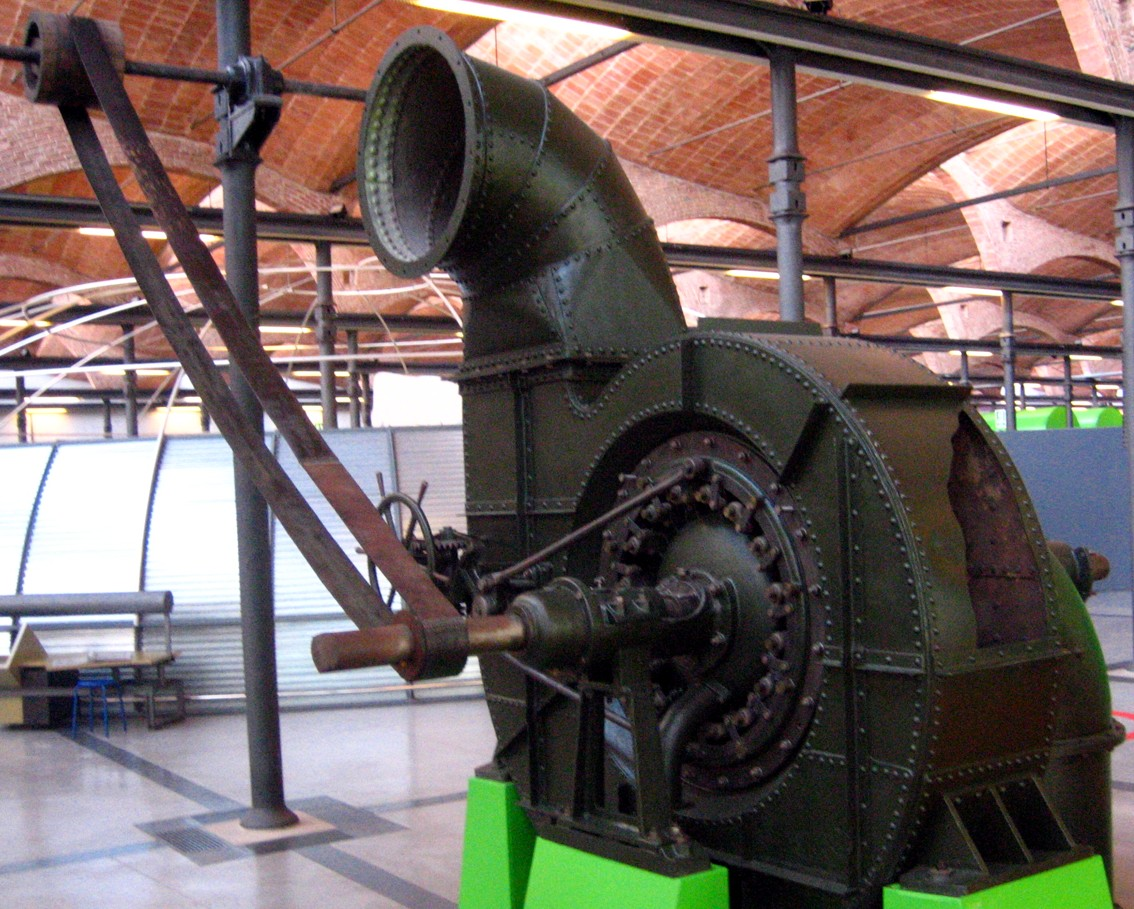 Ancient Francis-Turbine at Museu de la Ciència i de la Tècnica de Catalunya (Terrassa)